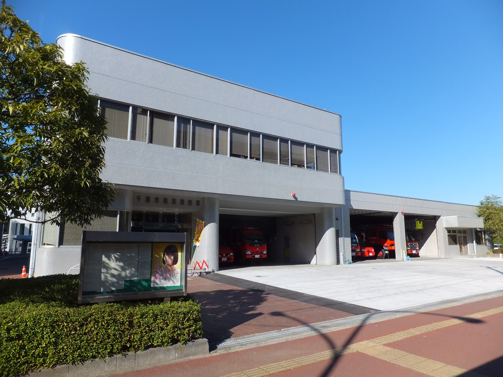 千葉市消防局、美浜消防署